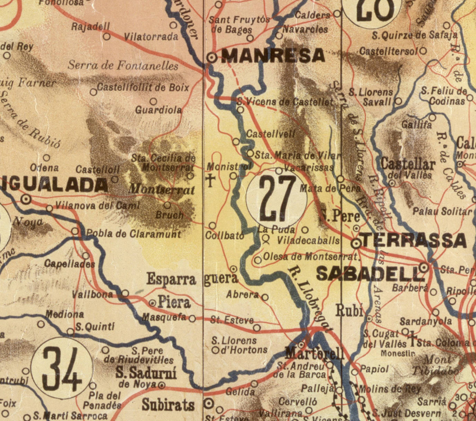 Comarca d'Olesa proposada al mapa de Catalunya realitzat per Francesc Flos i Calcat (1906) Font: Institut Cartogràfic i Geològic de Catalunya URL